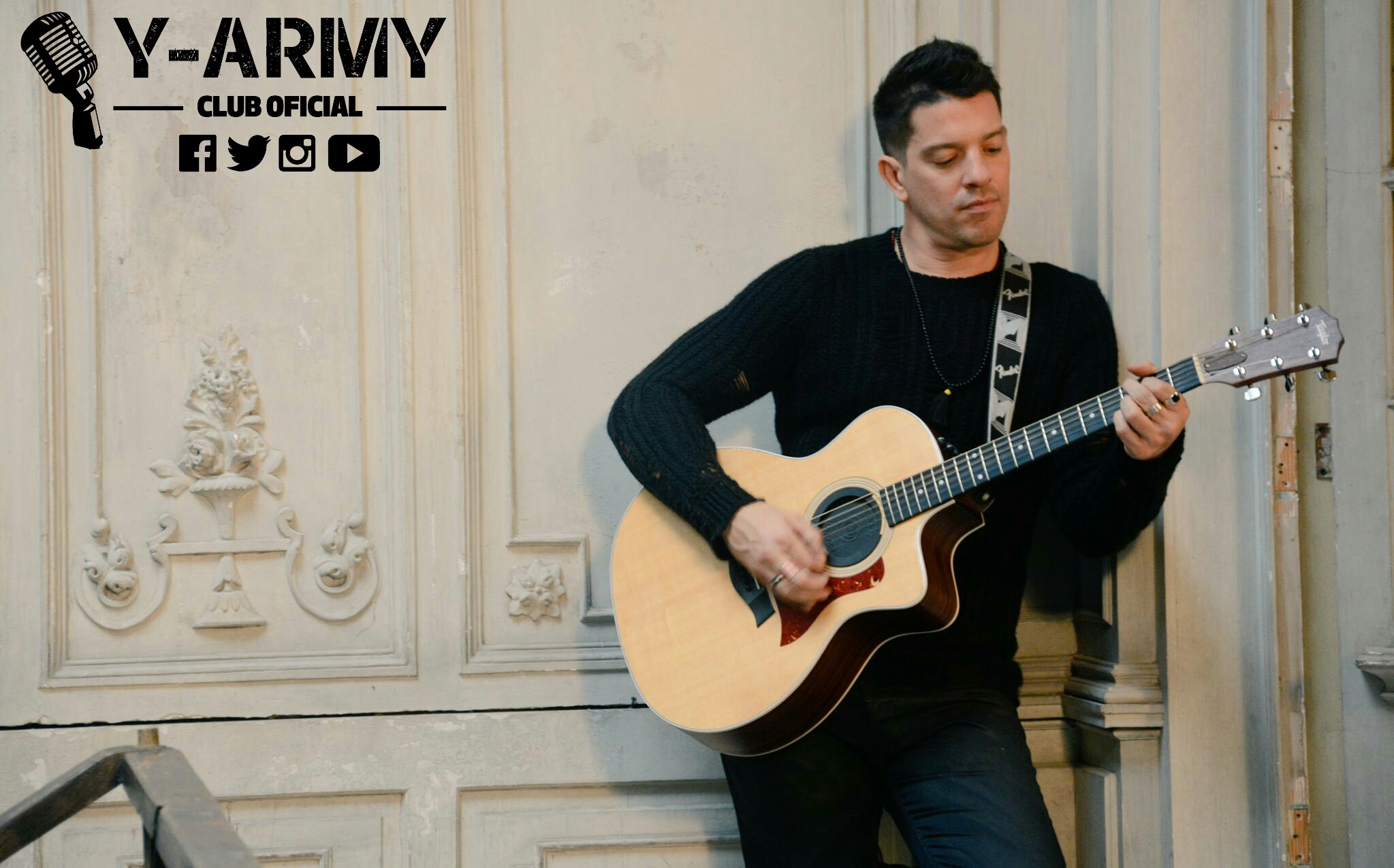 "Video Todo Pasará